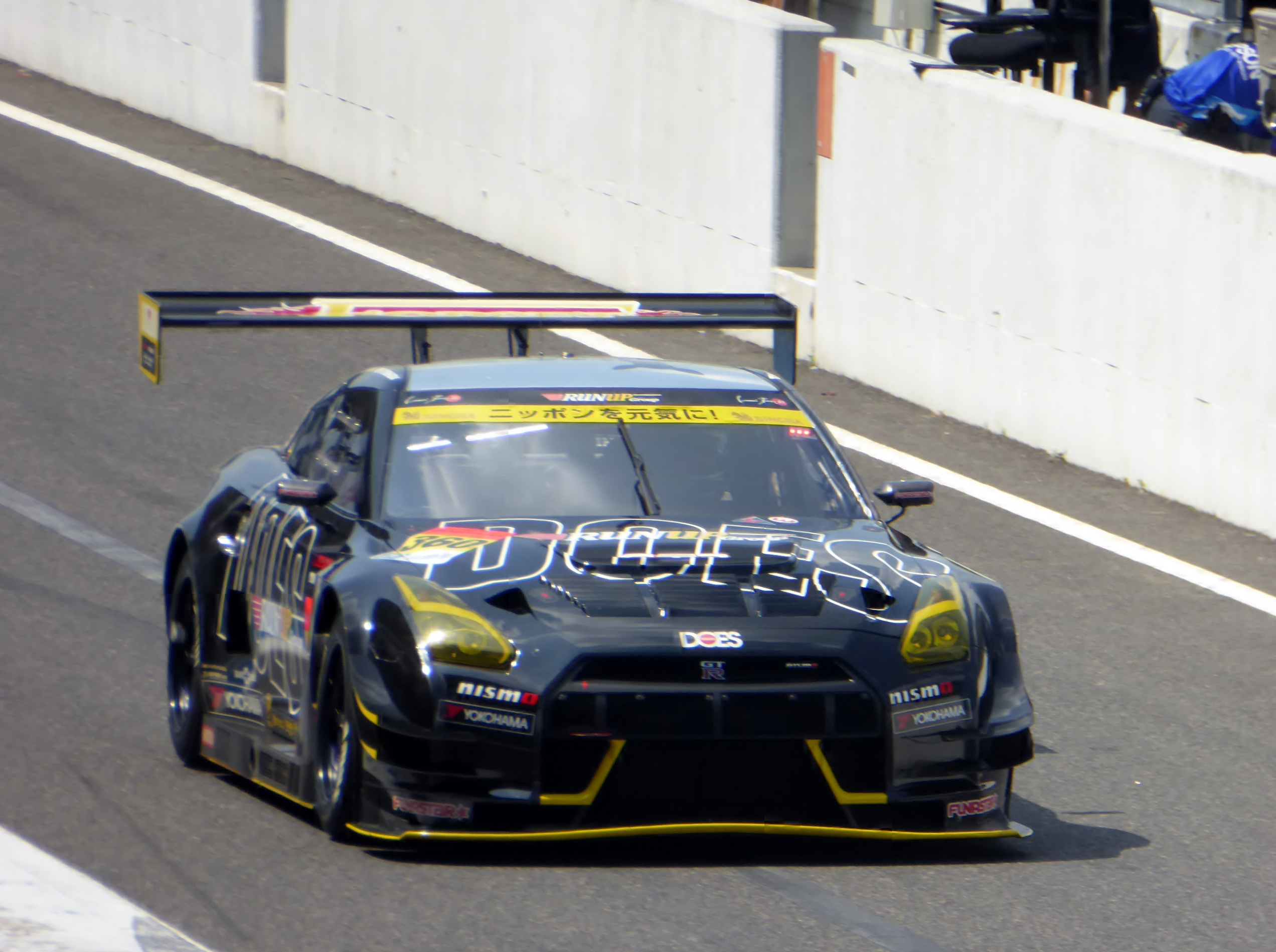 2015年度鈴鹿タイヤテストにおいて360号車RUNUP Group&DOES GT-Rを撮影。